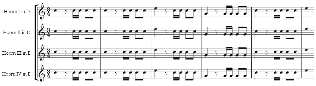 Openingsthema van de Symfonie n° 31 van J. Haydn